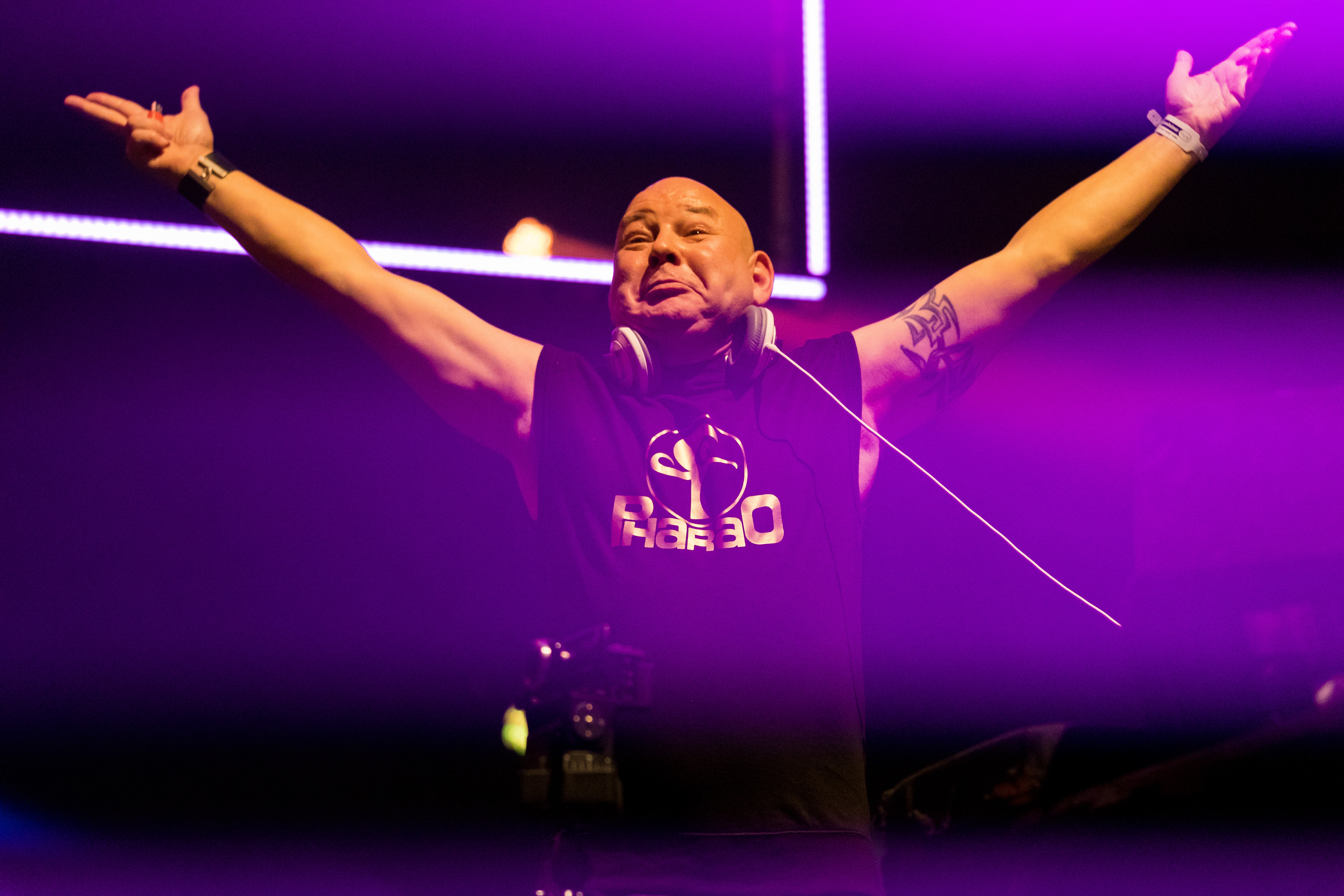 Pharao during Sunshine Live - Die 90er Live on Stage at Maimarkthalle & Maimarktclub, Mannheim, Baden-Württemberg, Germany on 2017-11-25, Photo: Sven Mandel